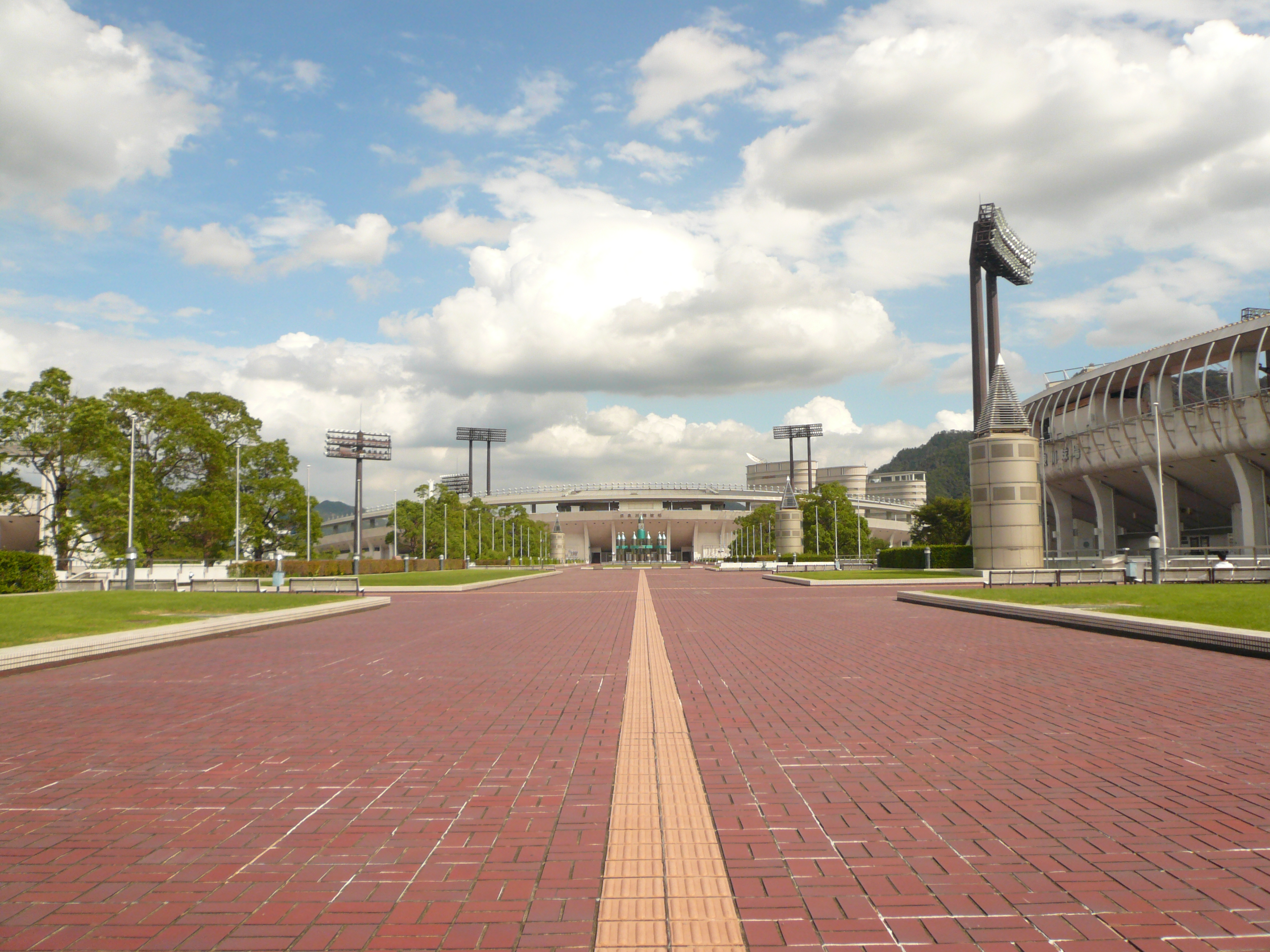 Gifu Memorial Center Sunsun Deck（岐阜メモリアルセンター）,Gifu,Gifu(岐阜県岐阜市)で撮影。サンサンデッキ